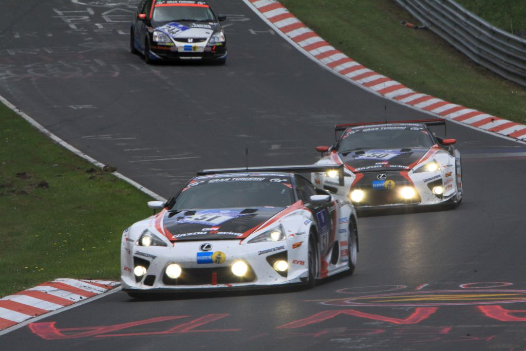 Lexus LF-A